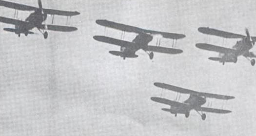 Fuerza Aerea de Guatemala en tiempos del General Jorge Ubico Castañeda